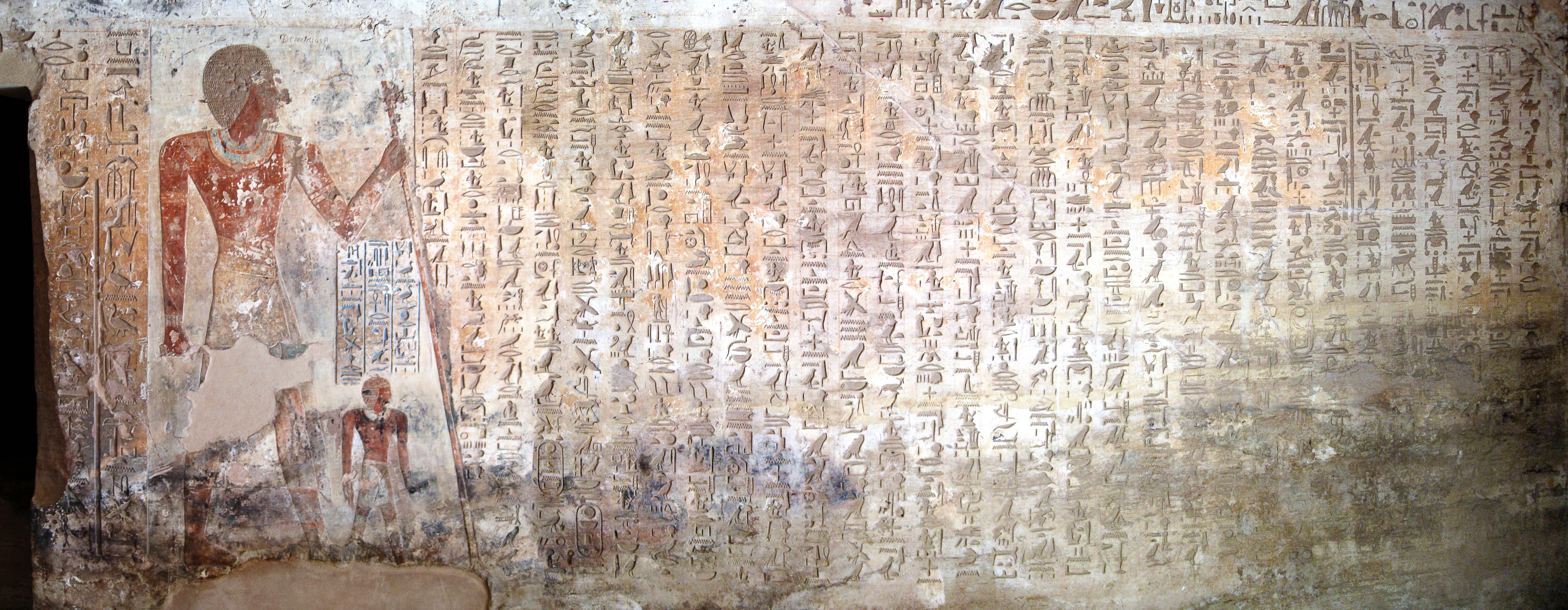 Inschrift der Biografie des Ahmose, Sohn der Ebana, mit der Beschreibung des Kampfes gegen die Hyksos in seinem Felsengrab des altägyptischen Necheb, heute el-Kab, Ägypten.